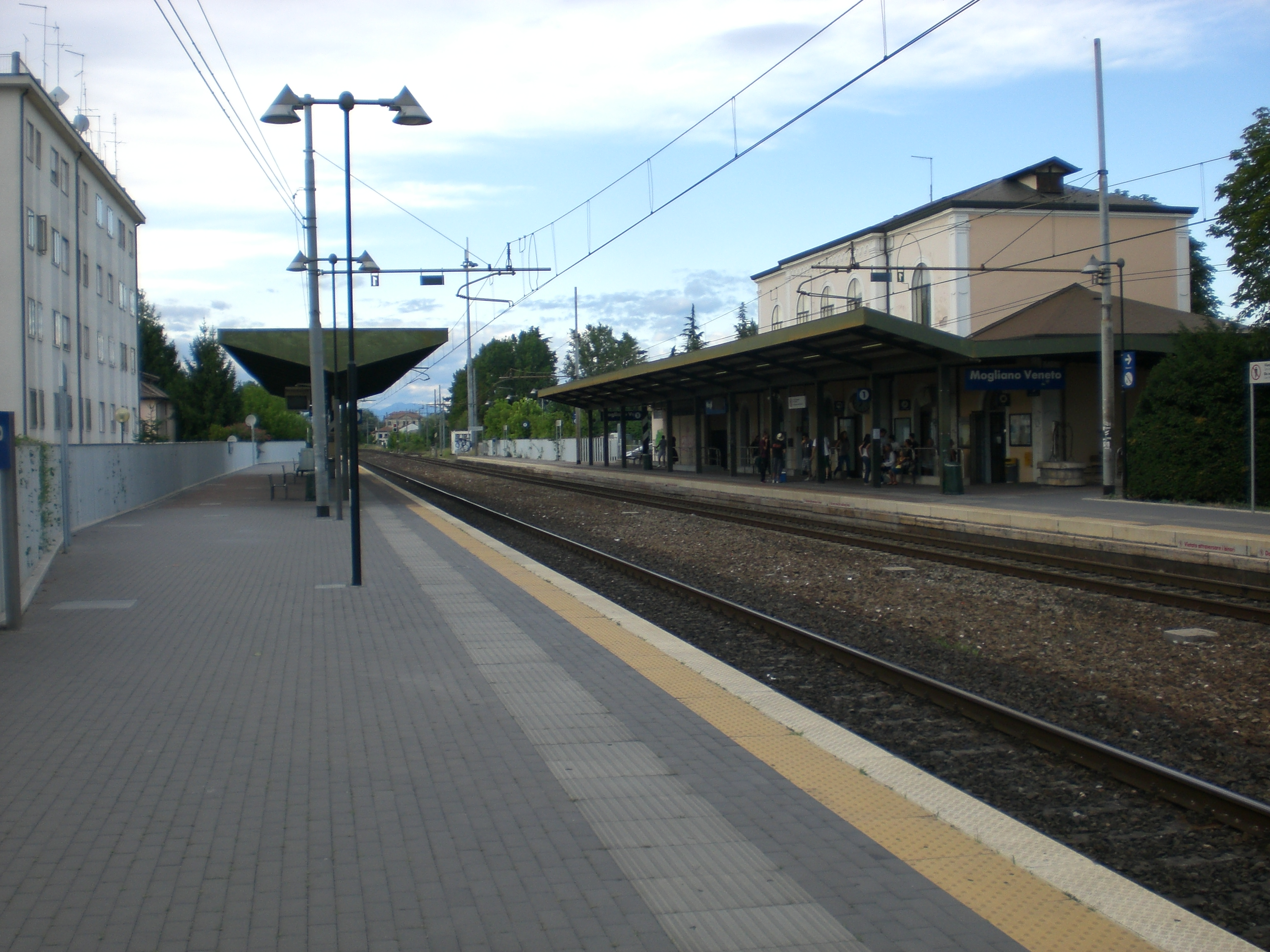 FS Mogliano Veneto